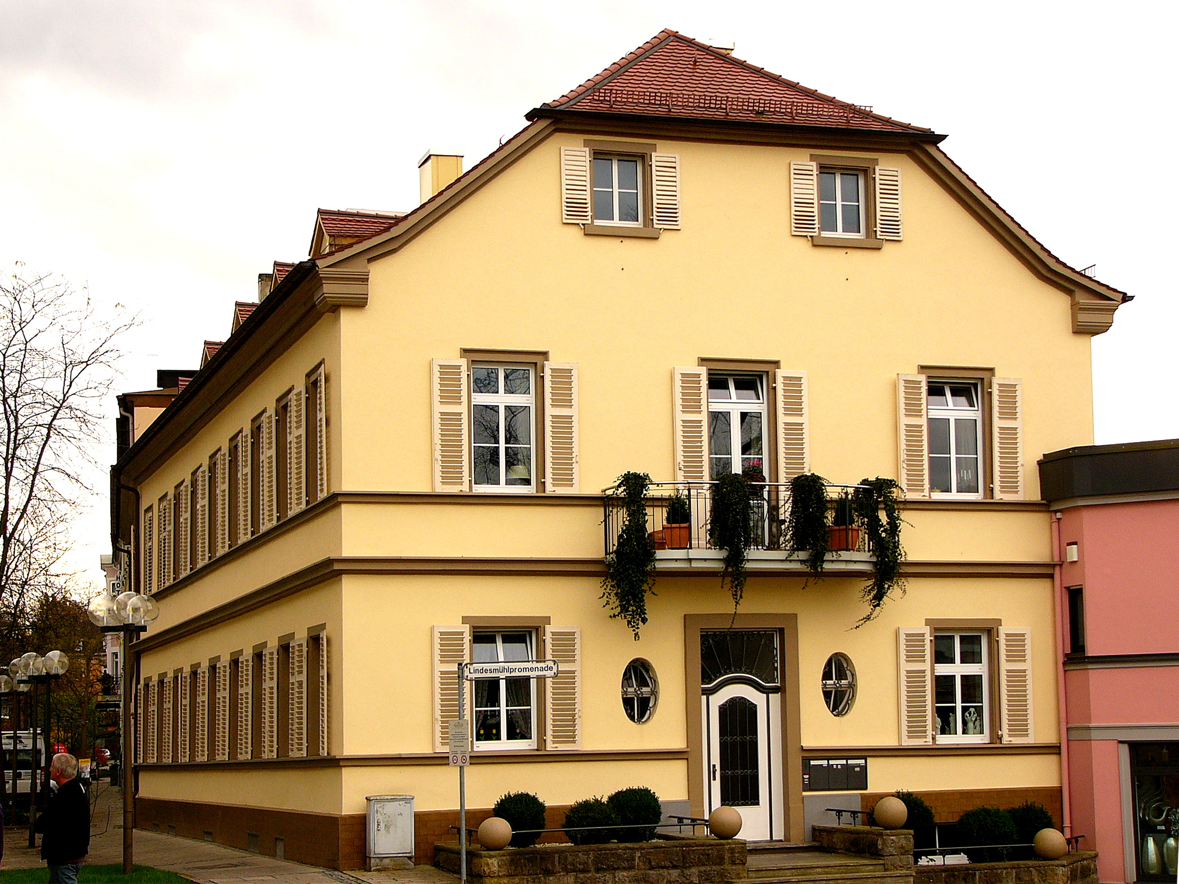 Wohngebäude; zweigeschossiger, verputzter Halbwalmdachbau, biedermeierlich, um 1830. This is a photograph of an architectural monument.